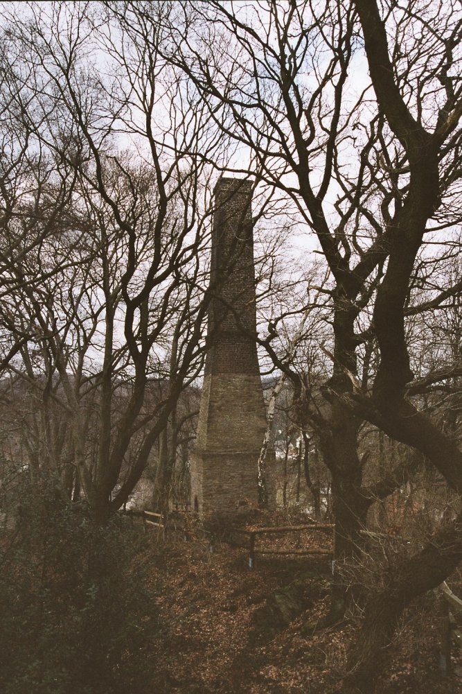 Ein Wetterschornstein für die Heranführung frischer Wetter